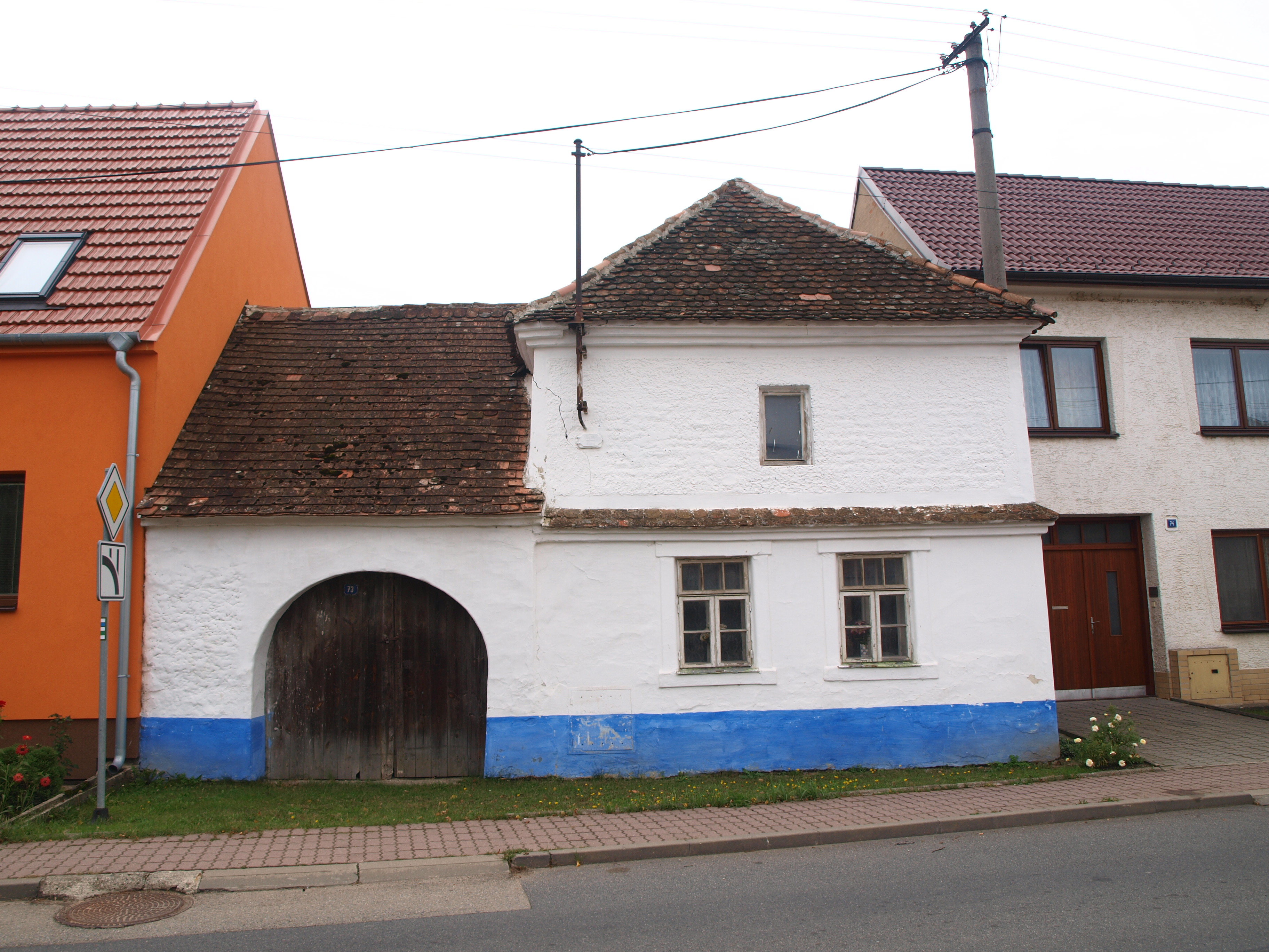 Venkovská usedlost, Javorník 73, s patrovou komorou - výškou